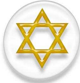 यहूदी धर्म का प्रतीक चिह्न